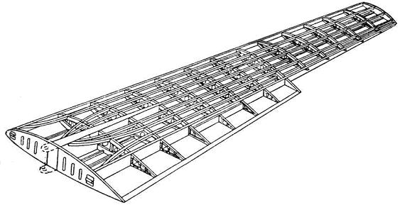 Glider wing